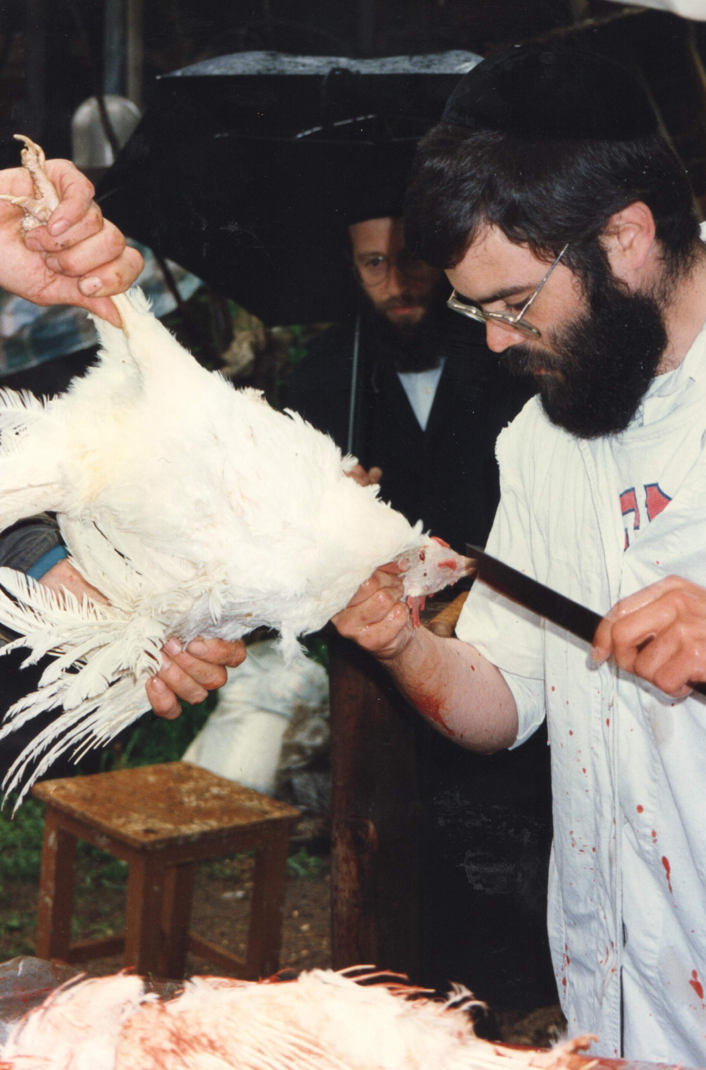 schita